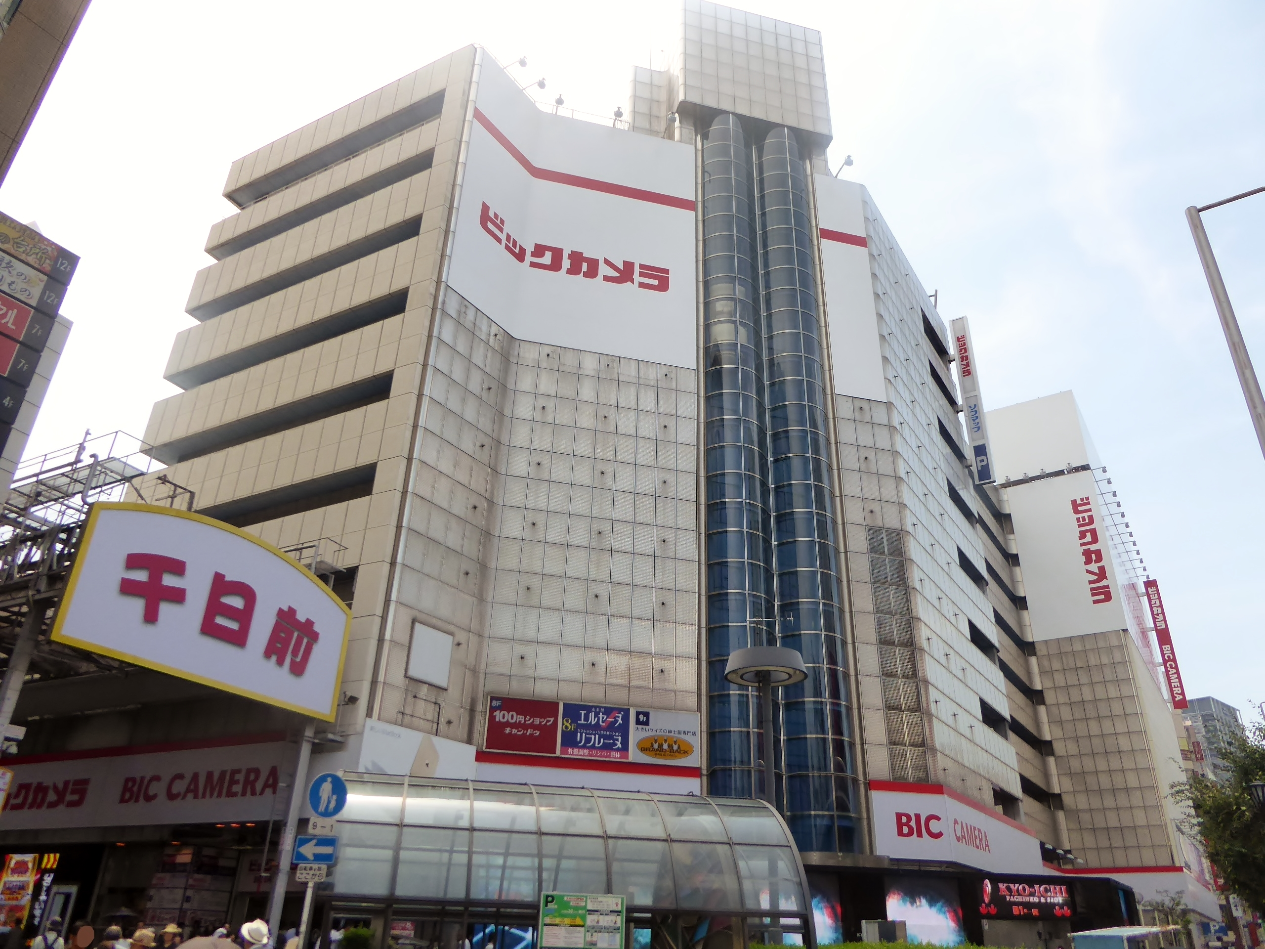 ビックカメラなんば店を撮影。